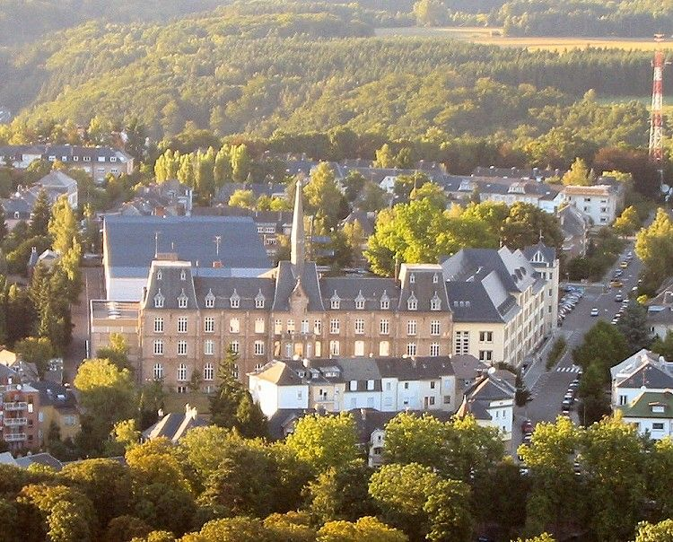 Lycée Technique des Arts et Métiers